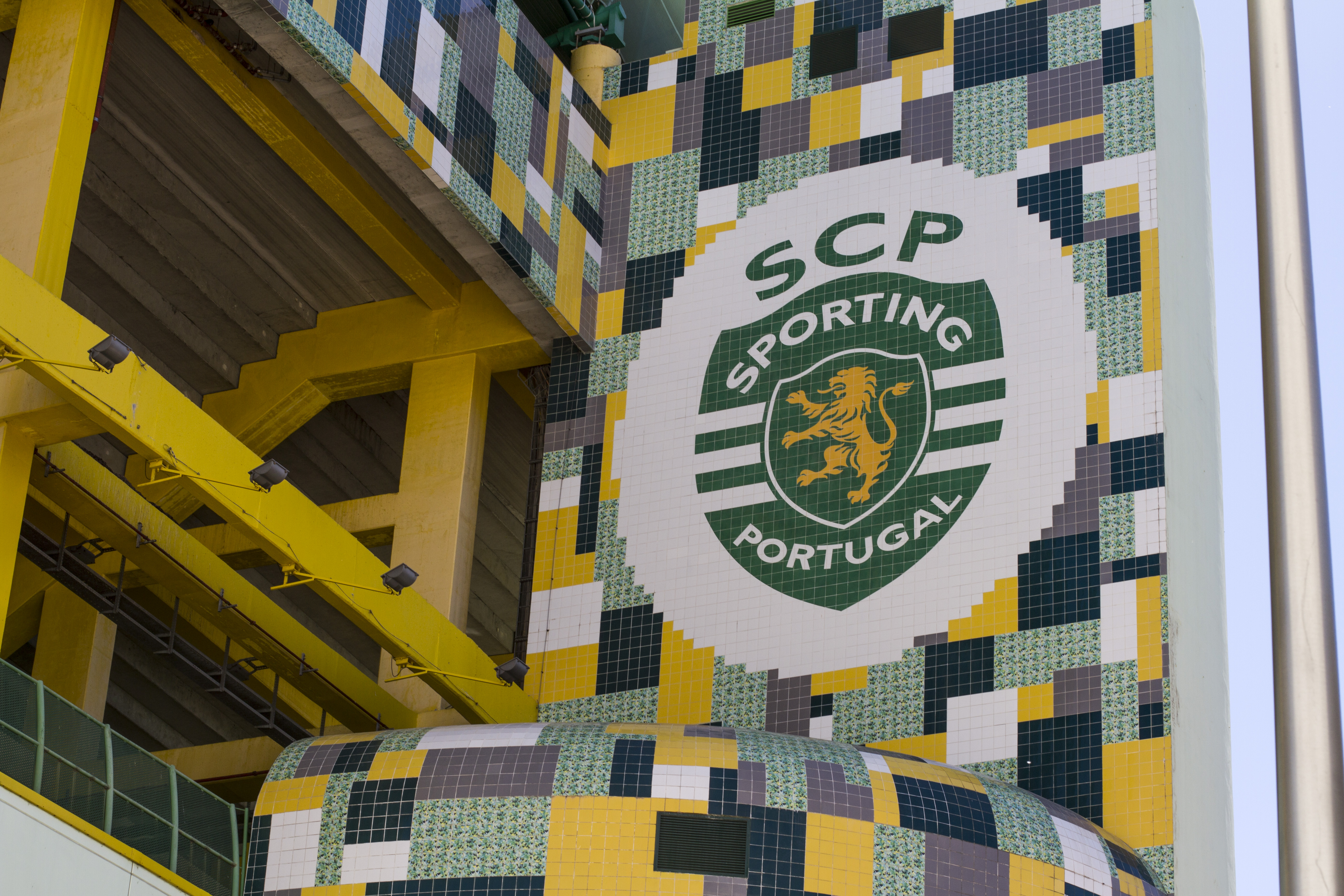 Holiday in Lisbon